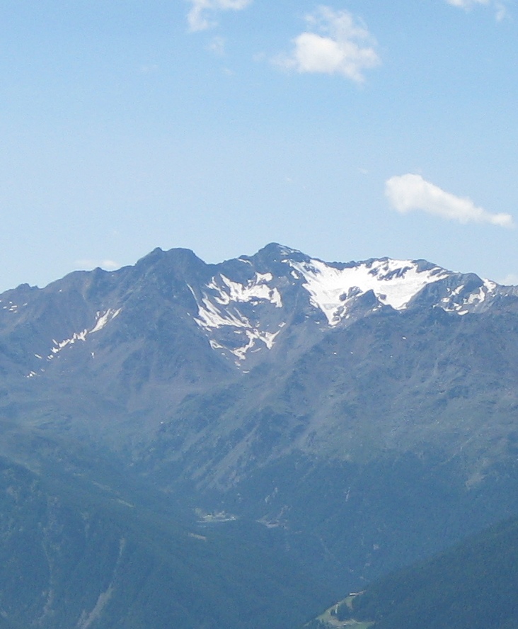 Vordere und Hintere Eggenspitze sowie Lorchenspitze von der Ultner Hochwart (von Osten) aus gesehen, Ausschnitt aus File:Blick Richtung Westen von der Ultner Hochwart.jpg